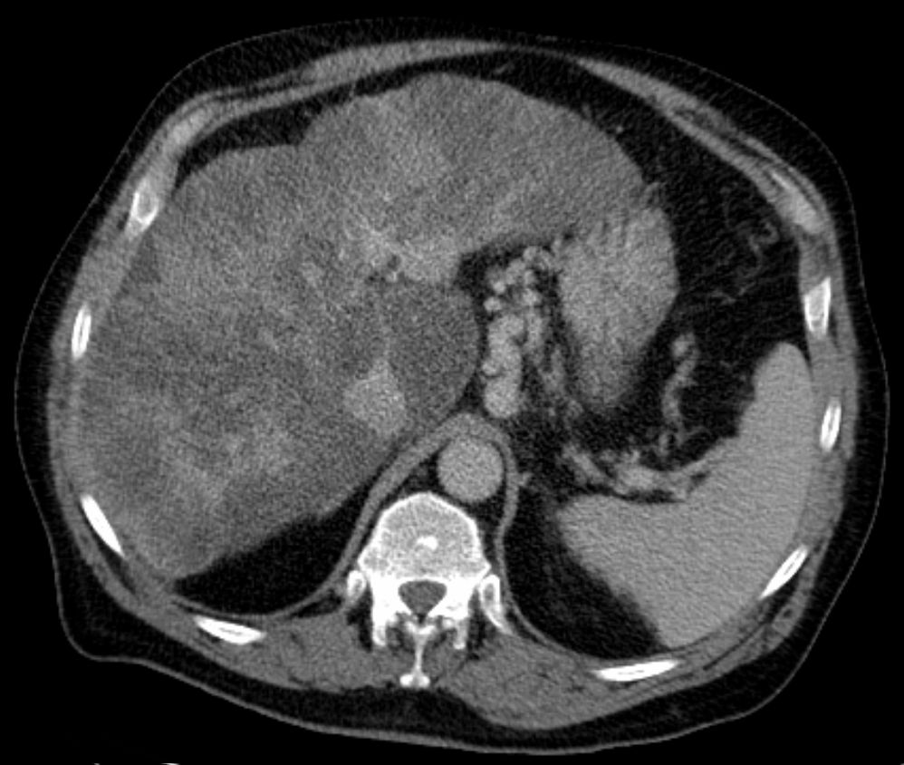 Fundusvarizen bei Leberzirrhose mit portaler Hypertension. Computertomographie axial.